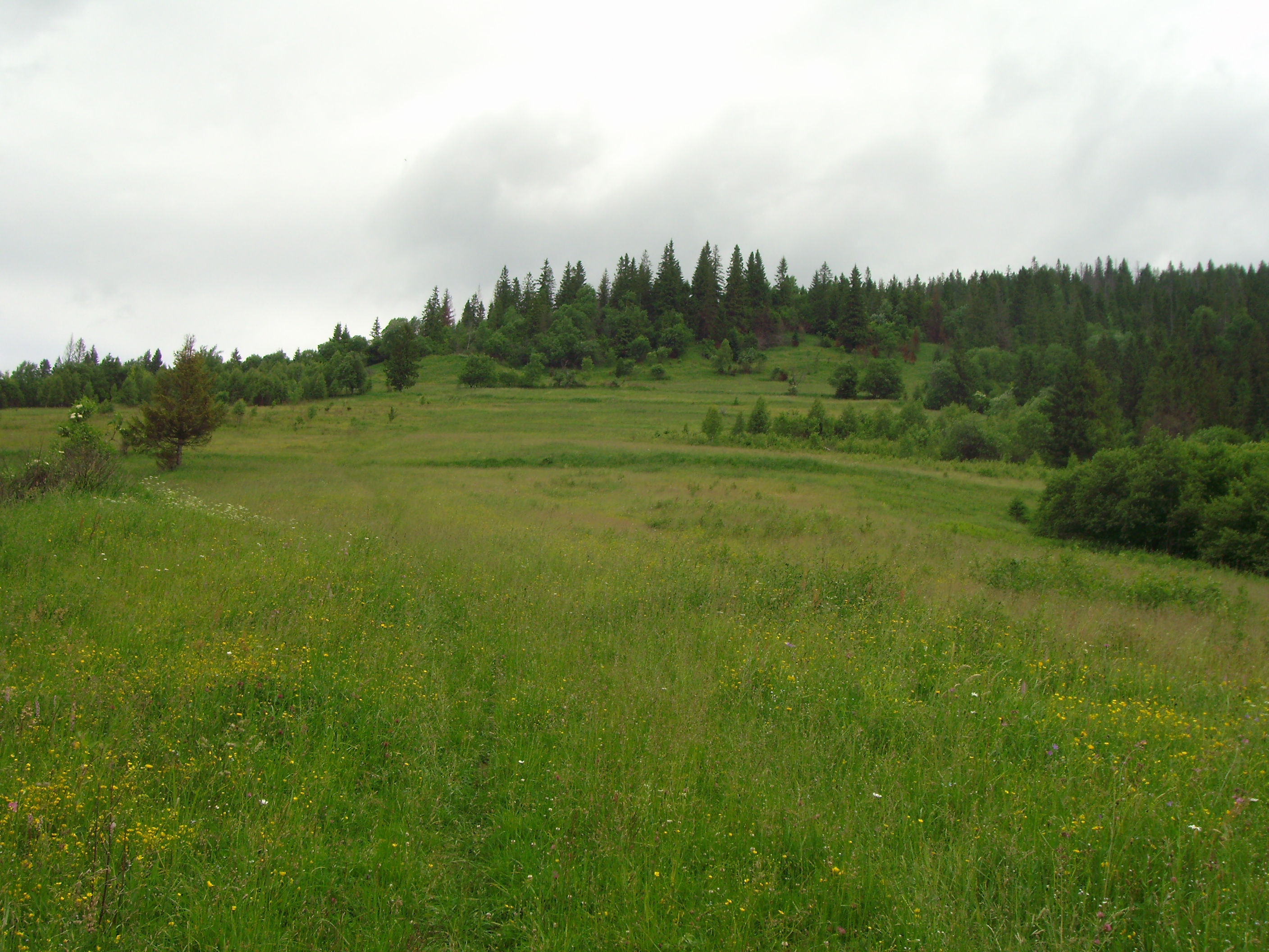 Der Hang von Orava zum Zwinin I, deutlich noch die parallel verlaufenden Wälle der alten Stellungen zu erkennen